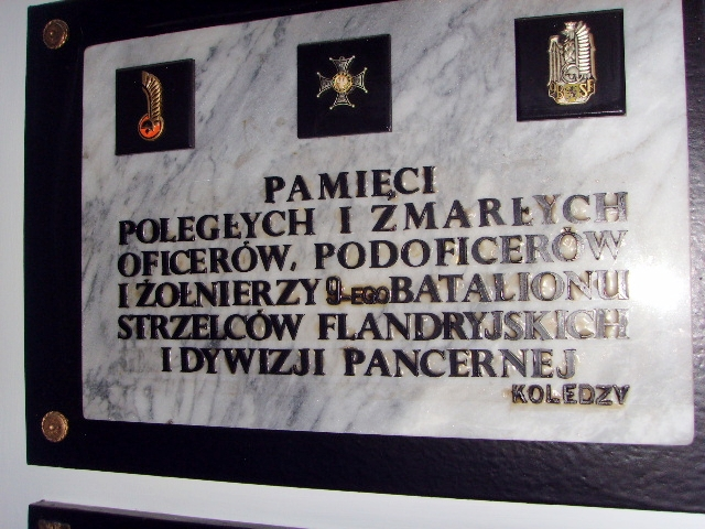 Tablica w kościele św. Andrzeja Boboli w Londynie